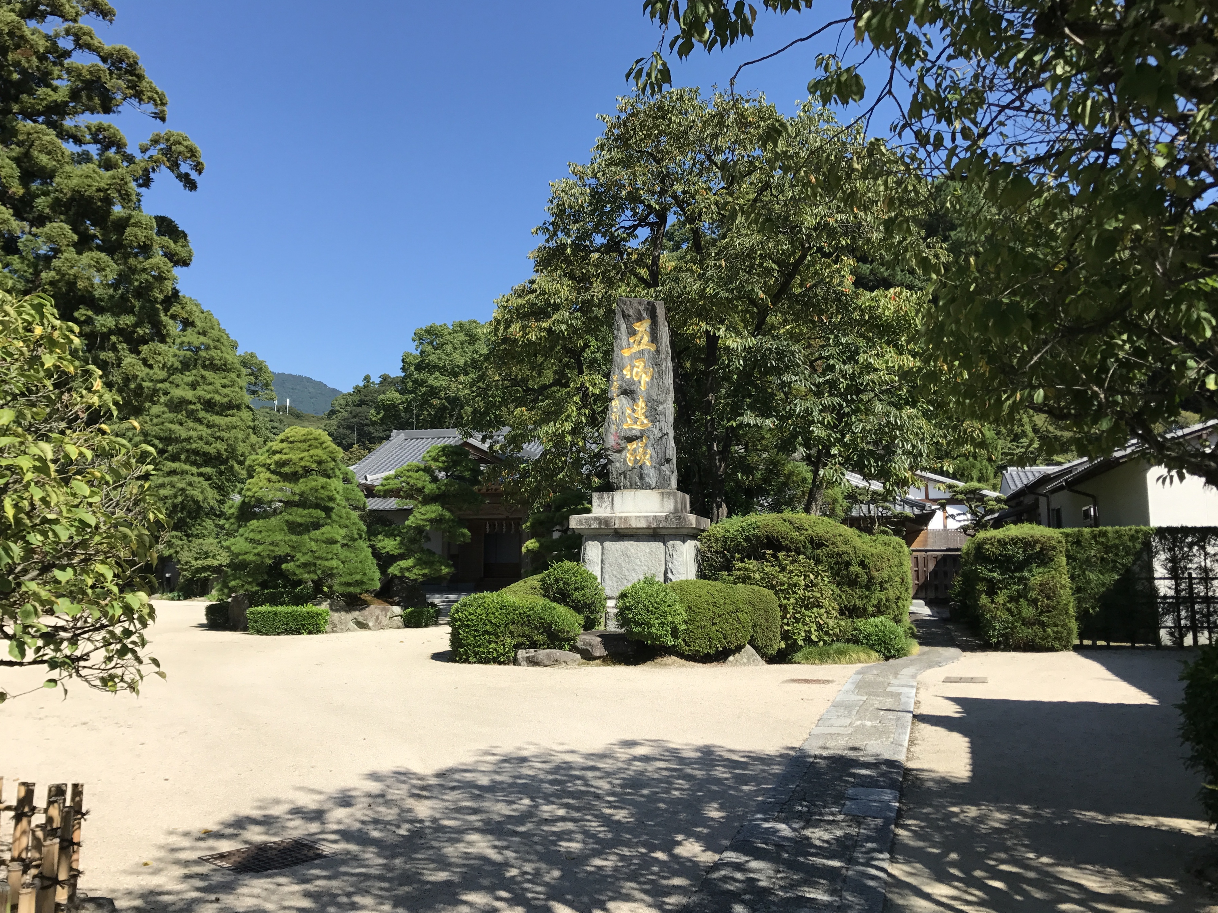 太宰府天満宮・延寿王院境内